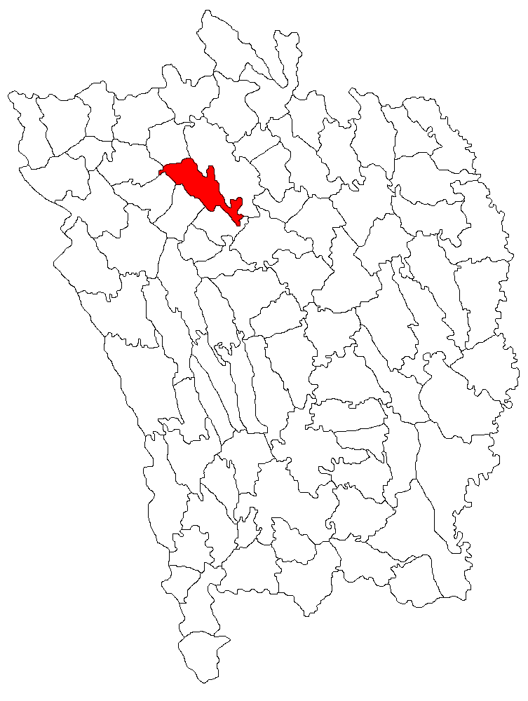 Categorie:Hărţi ale judeţului Vaslui